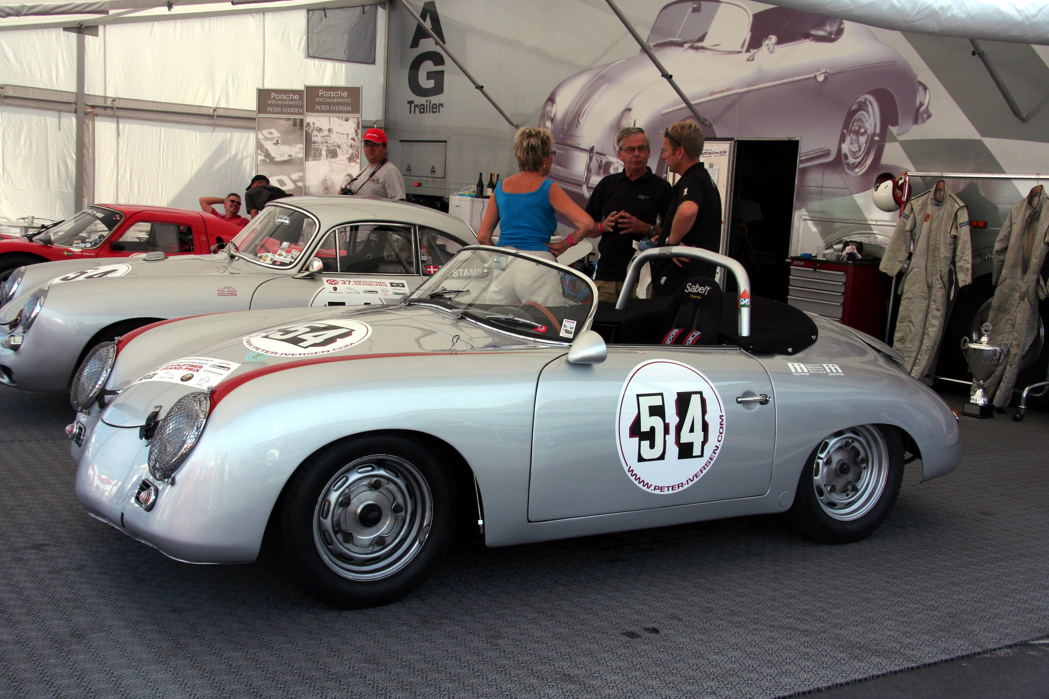 Porsche Speedster beim AvD-Oldtimer-Grand-Prix 2009 auf dem Nürburgring